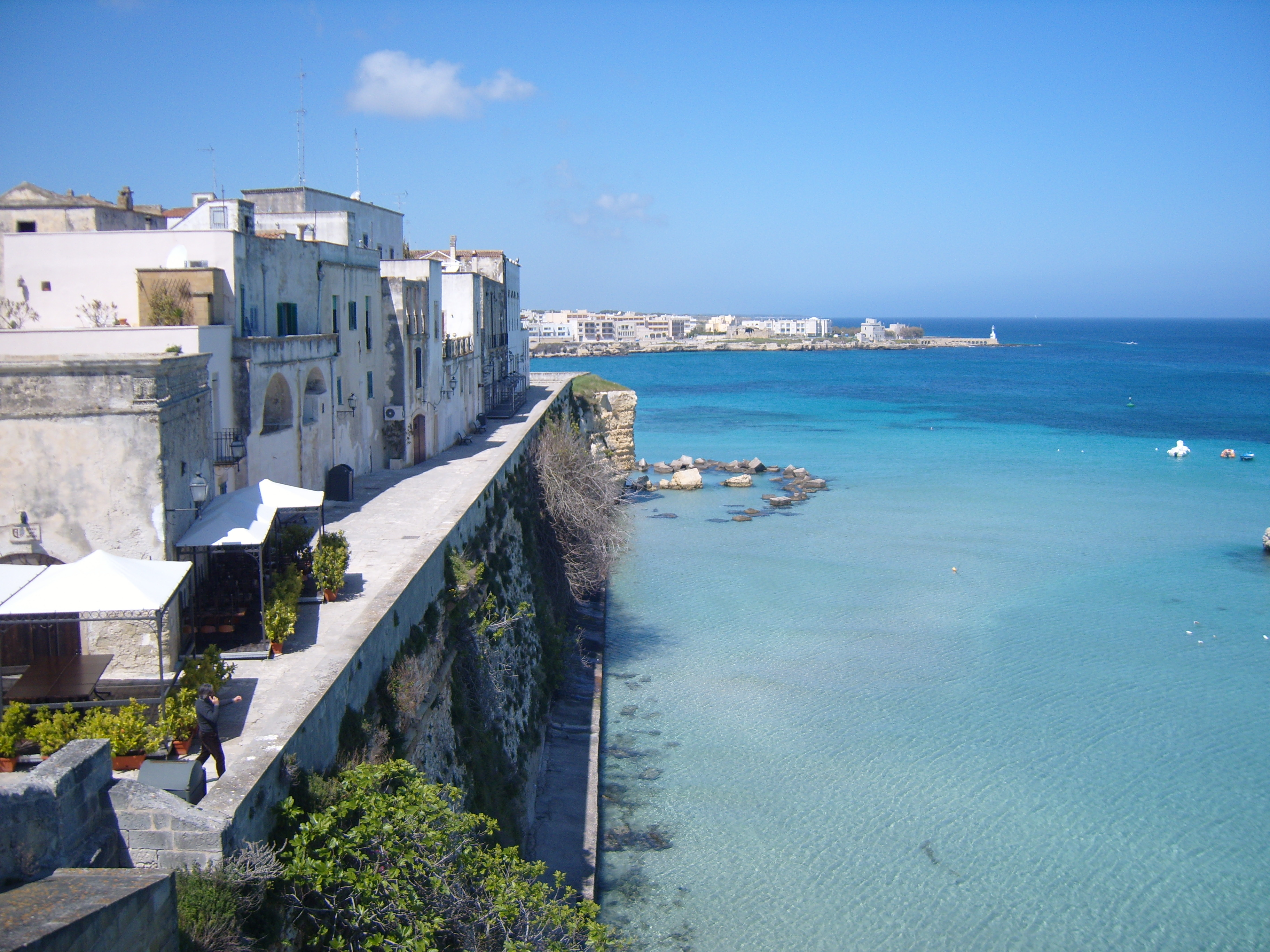 Veduta di Otranto dal bastione dei Pelasgi